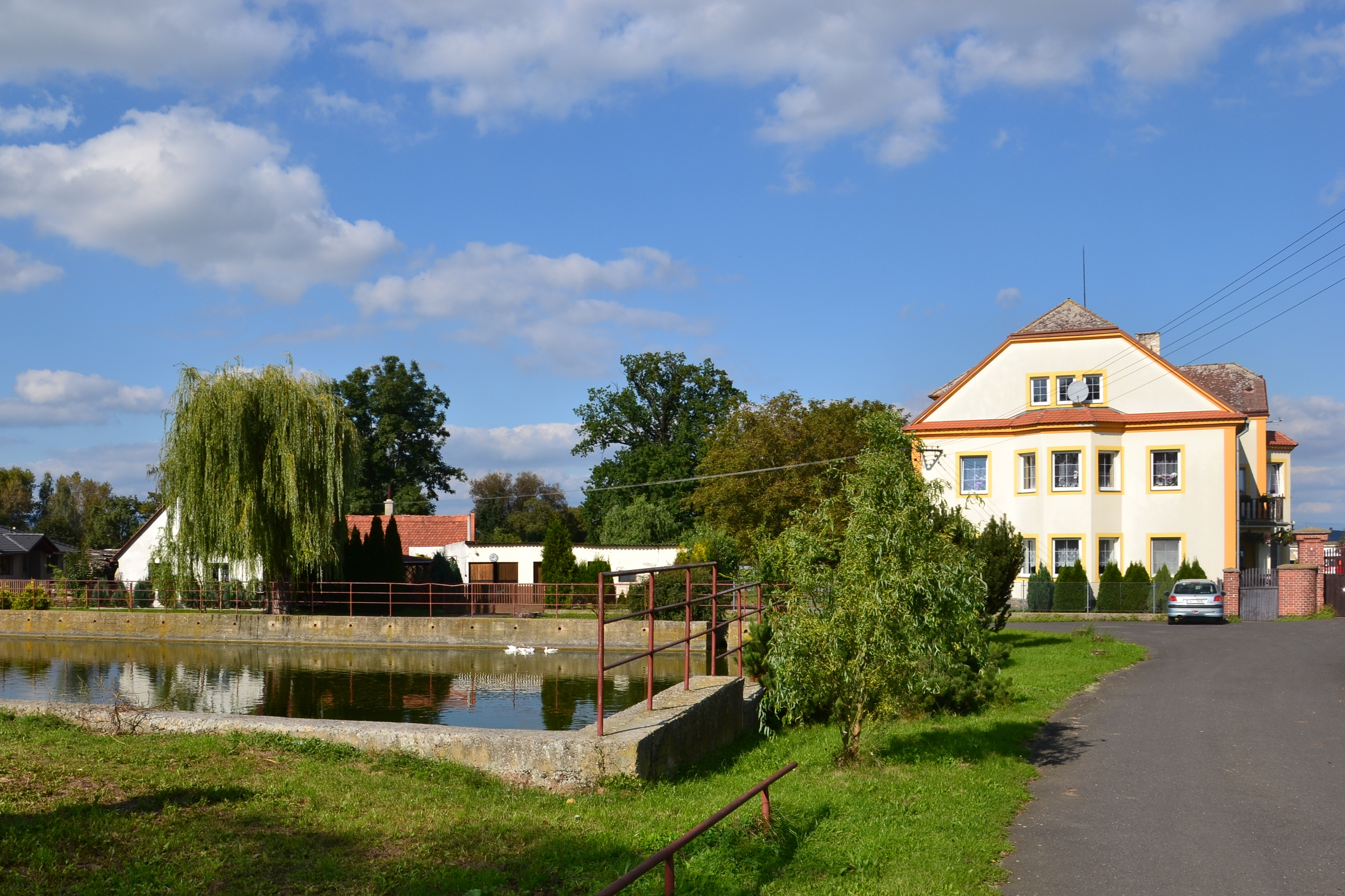 Chbany - původní náves